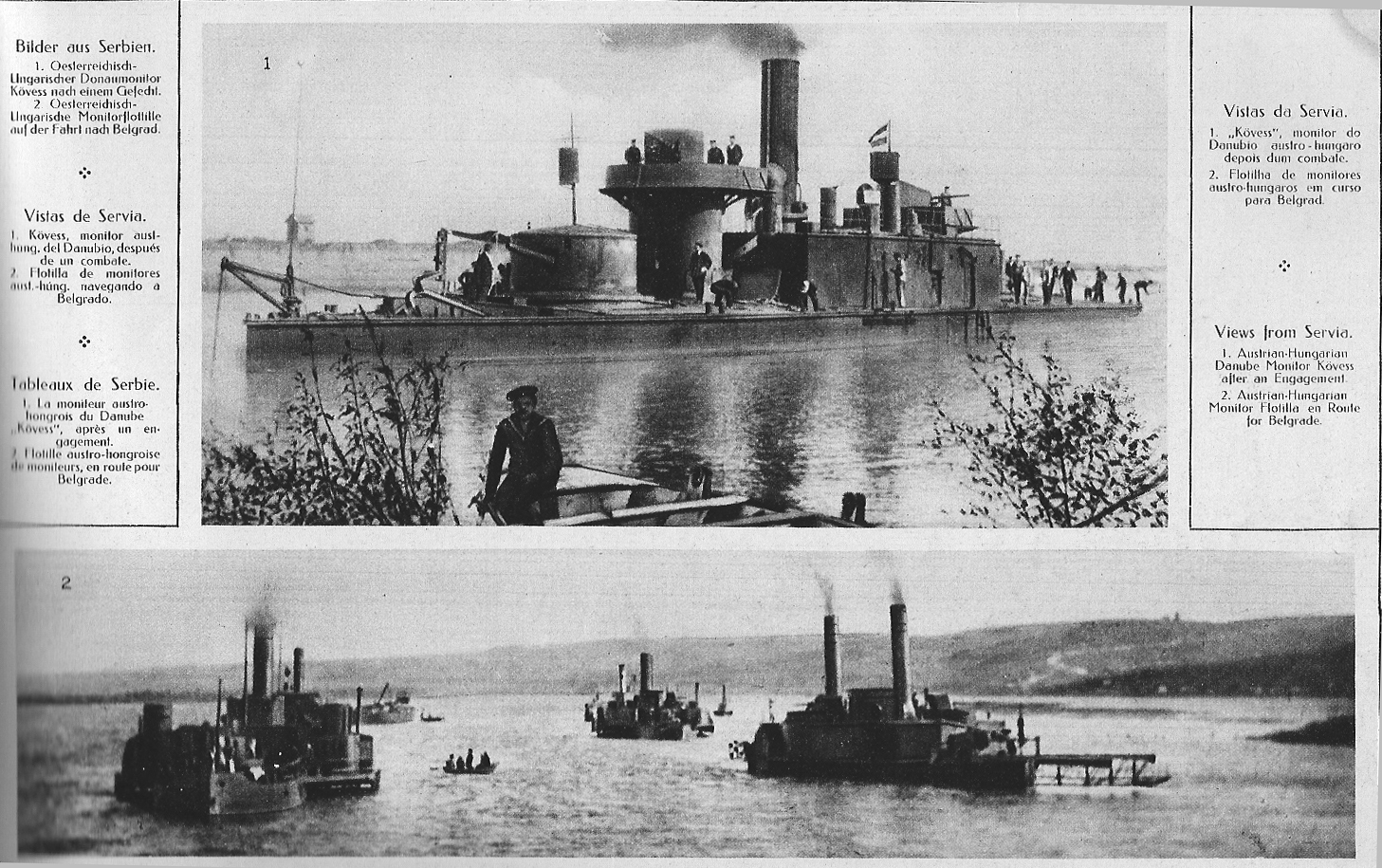 des monitors (bâteaux de guerre) sur le Danube allant bombarder Belgrade, le Kovess en haut.